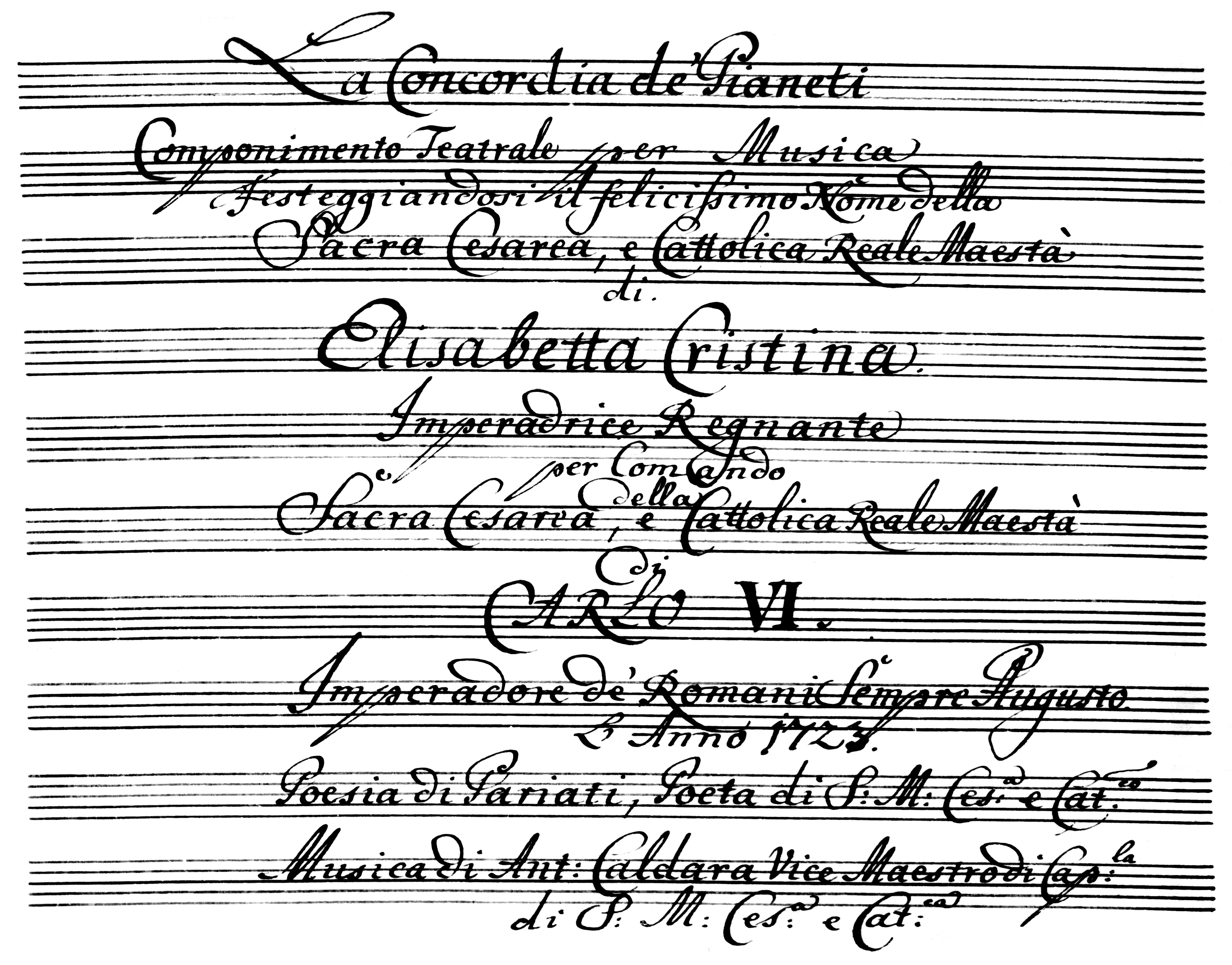 Antonio Caldara - La concordia de' pianeti - title page of the manuscript - Vienna 1723